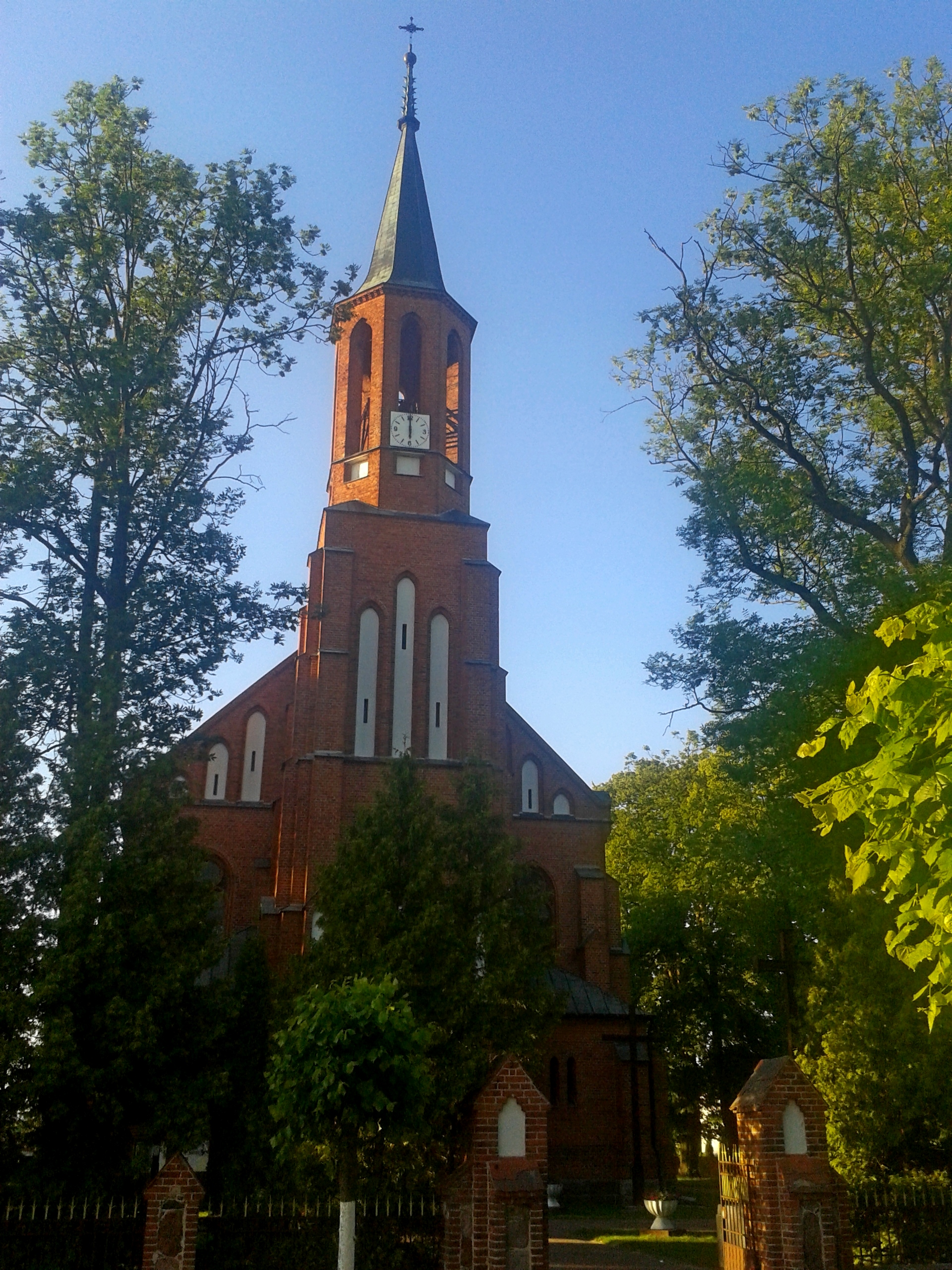 Kościół św. Elżbiety w Konstantynowie